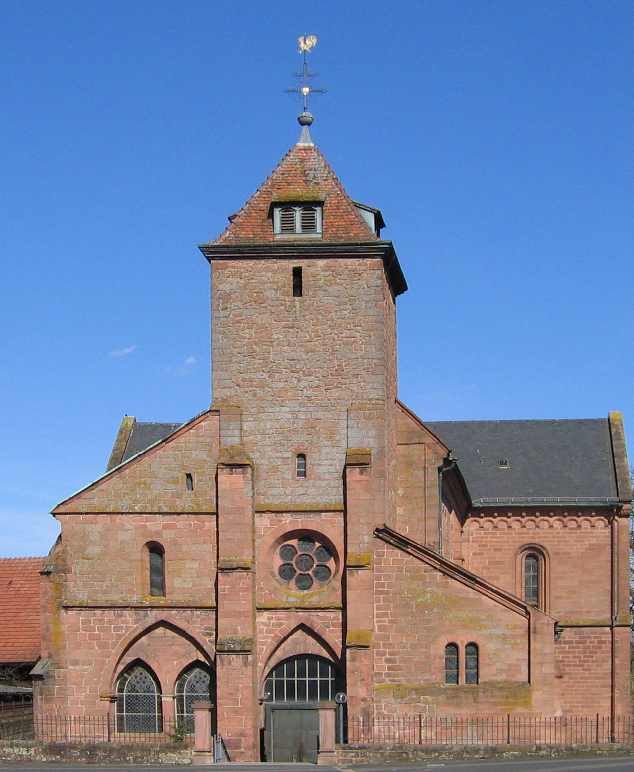 Description: church in Enkenbach in Landkreis Kaiserslautern, Germany --Immanuel Giel 10:04, 13 April 2007 (UTC)